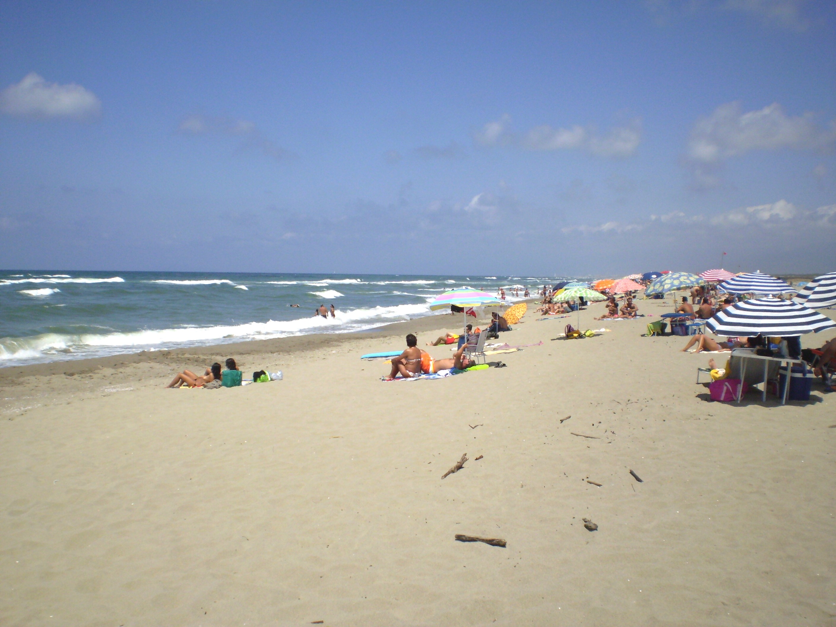 Vecchiano, Province of Pisa, Italy - Marina di Vecchiano